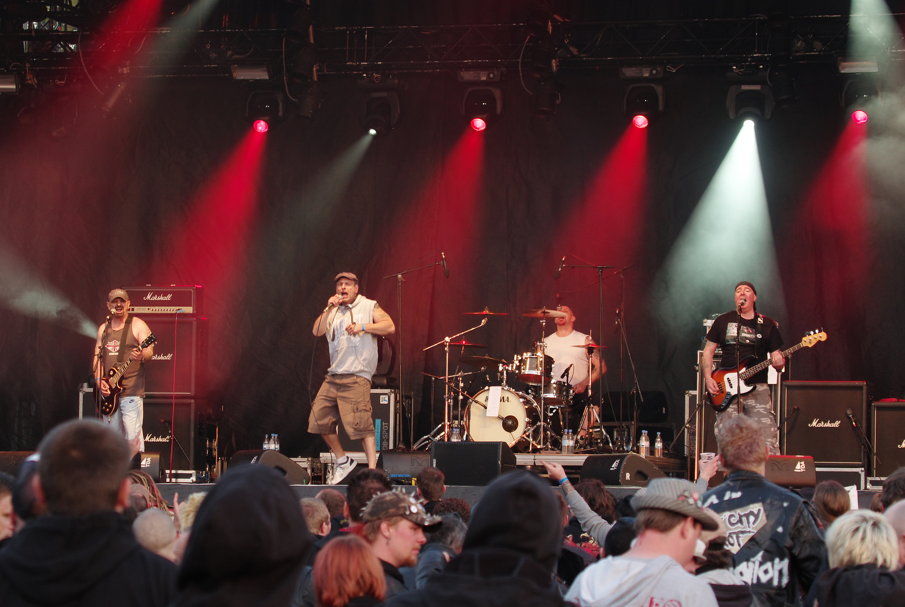 Cockney Rejects beim Ruhrpott Rodeo 2013 in Hünxe.